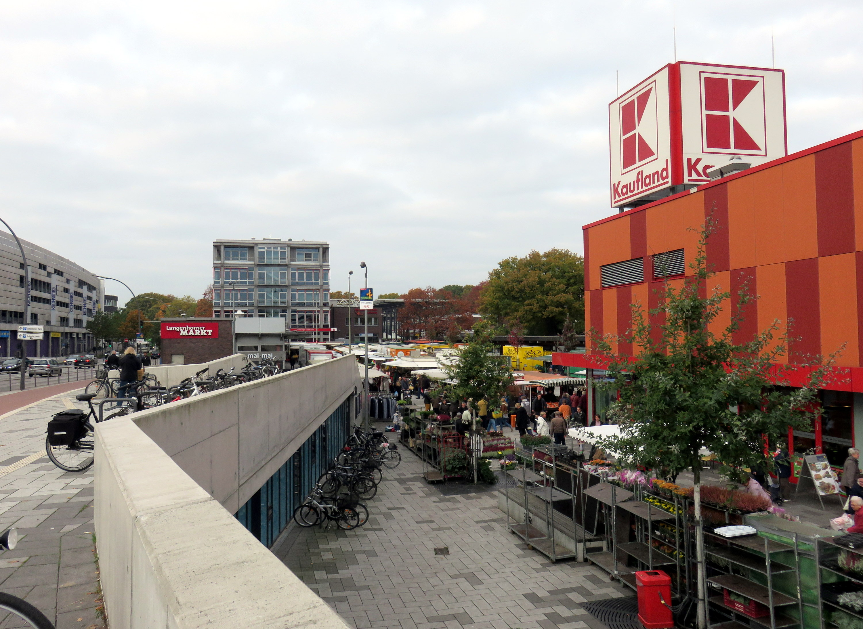 Wochenmarkt Langenhorn Markt am Krohnstieg (Ring 3) vor gleichnamigem Einkaufszentrum am Bahnhof der U-Bahn-Linie U1 in Hamburg-Langenhorn.